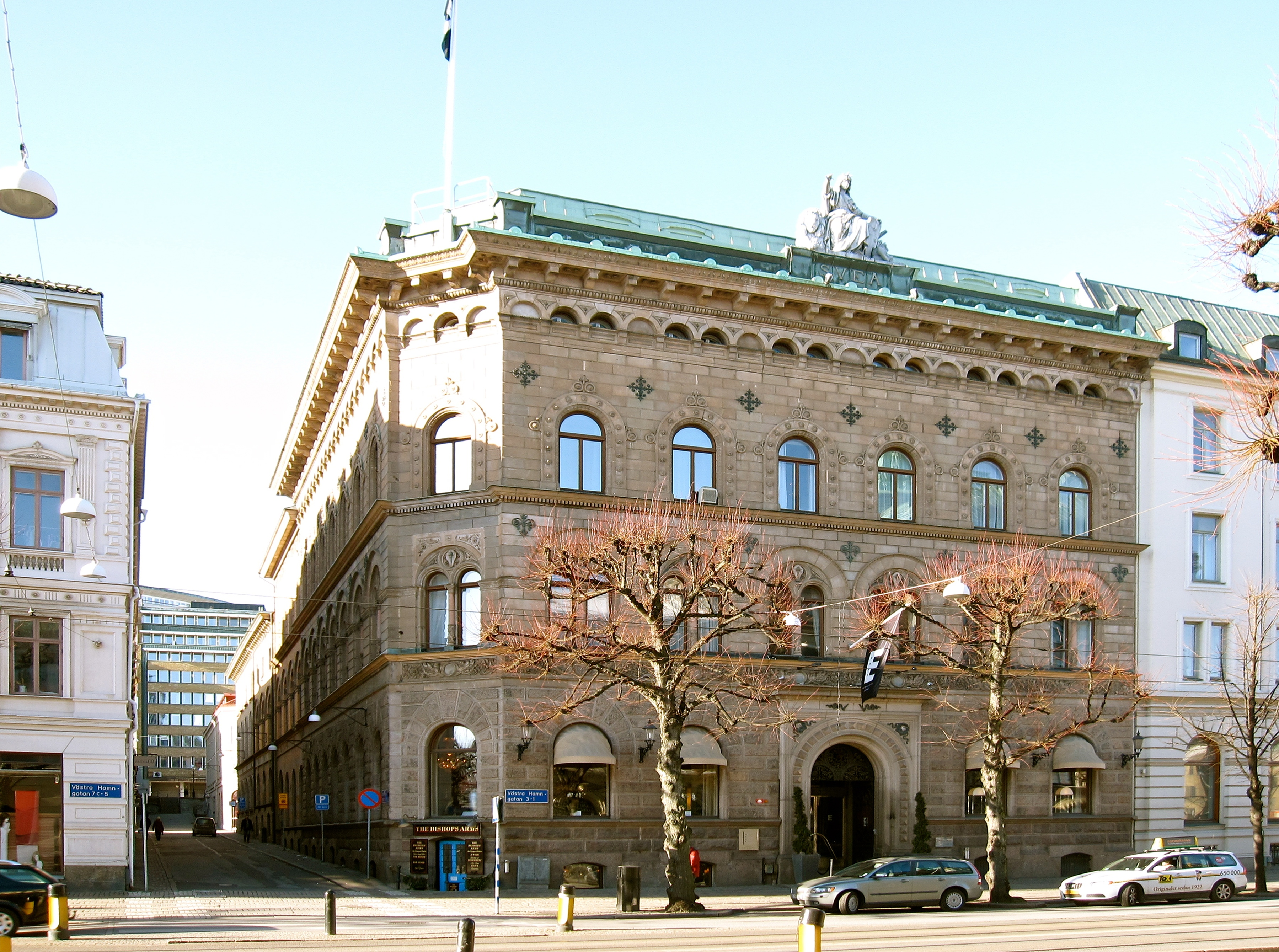 The 5-star Elite Plaza Hotel on Västra Hamngatan 3 in Göteborg.